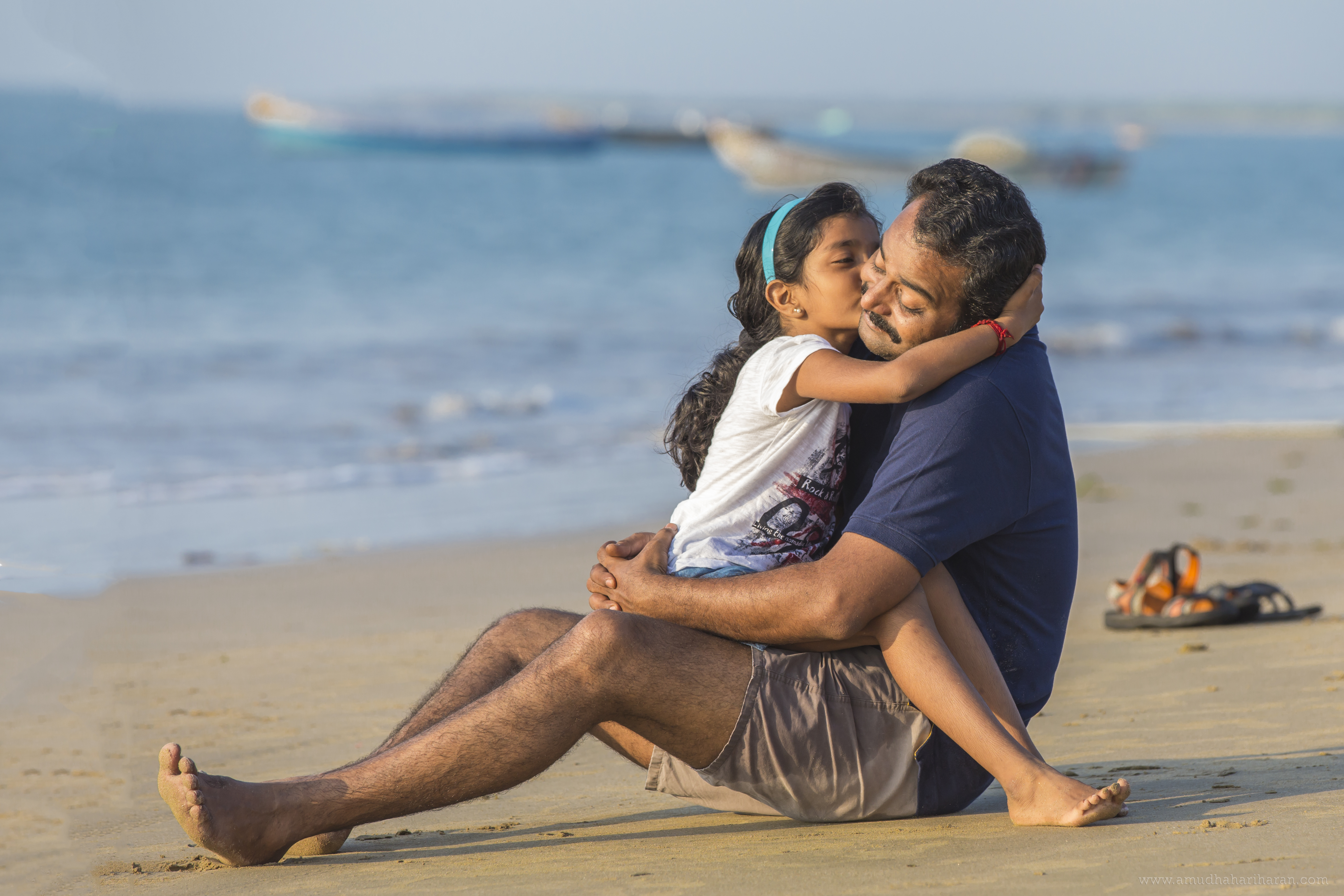 Na praia de Tuticorin, cidade do Distrito de Thoothukudi, na Índia, há uma relação de carinho familiar envolvendo o pai e a filha.